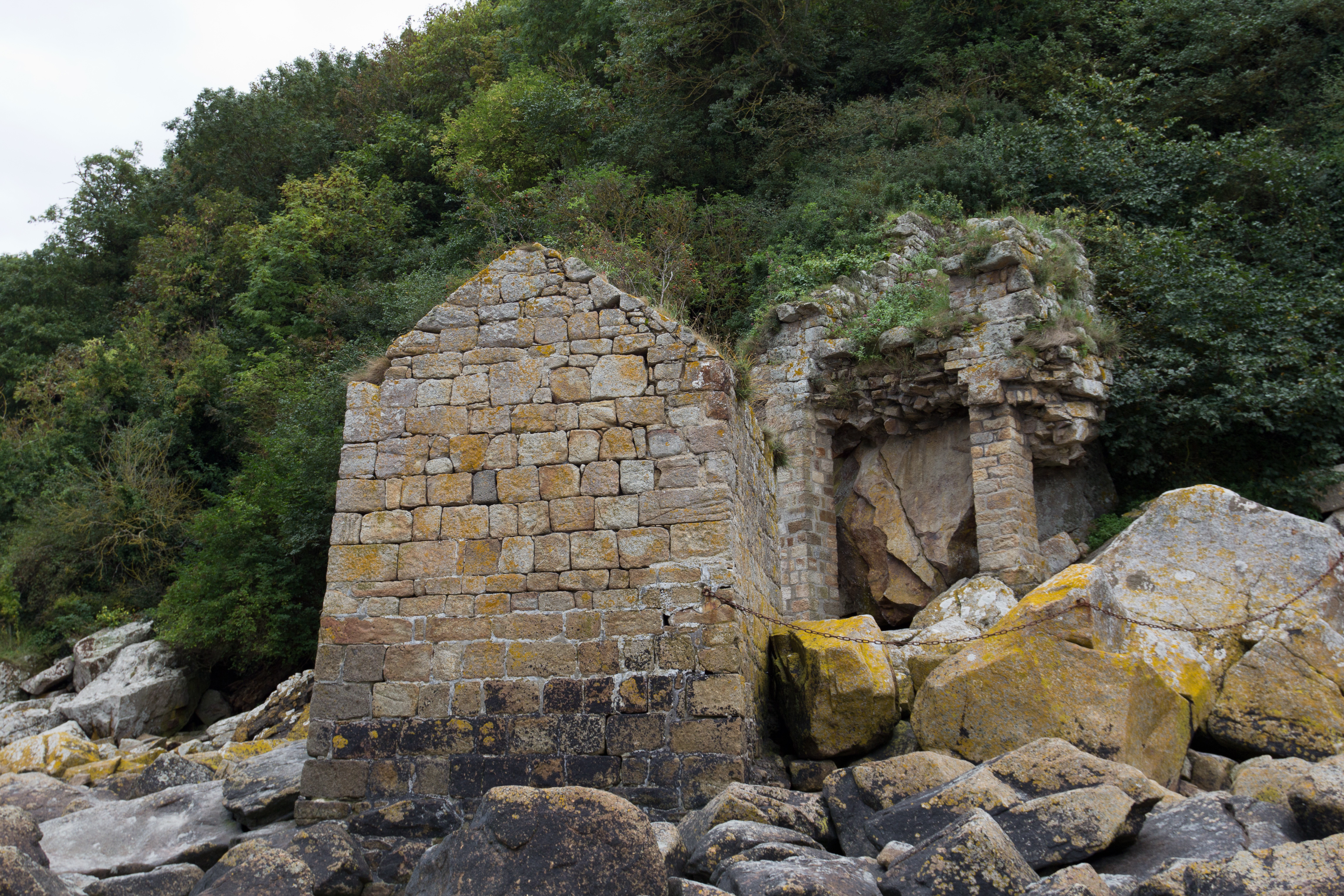 La fontaine est composée d'un édicule construit sur les rochers au nord du Mont. .